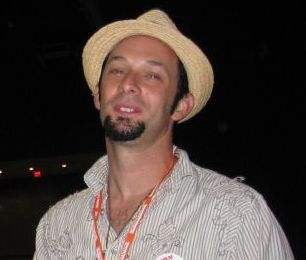 Katie Halper and Jeff Lieber